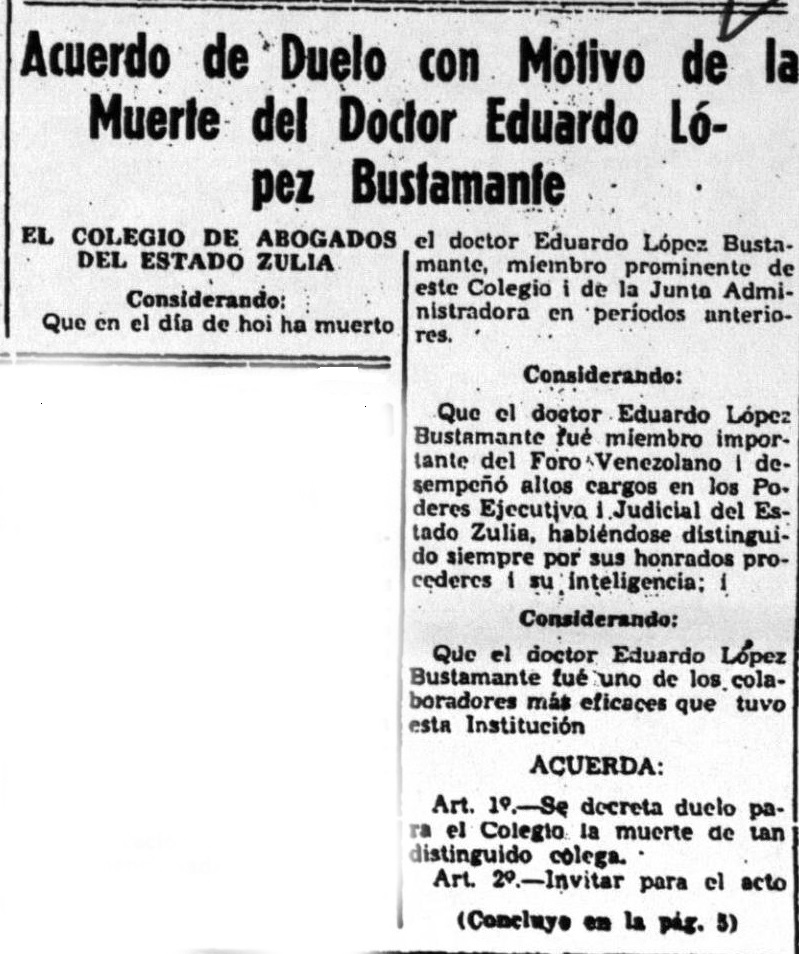 Acuerdo de duelo del Colegio de Abogados del Estado Zulia, Venezuela, con motivo de la muerte del Dr. Eduardo López Bustamante.